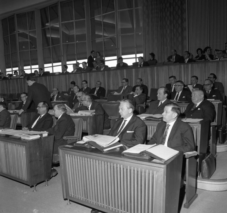 Plenarsitzung des Bundesrates unter Min. Präs. Dr. Diederichs (Niedersachsen) Ministerpräsident Kiesinger Ministerialdirektor Dr. Hailer (als Bevollmächtigter des Landes in Bonn m.W.d.G.b.) Innenminister Dr. Filbinger Minister für Ernährung, Landwirtschaft u. Forsten Leibfried Finanzminister Dr. Müller Wirtschaftsminister Dr. Leuze